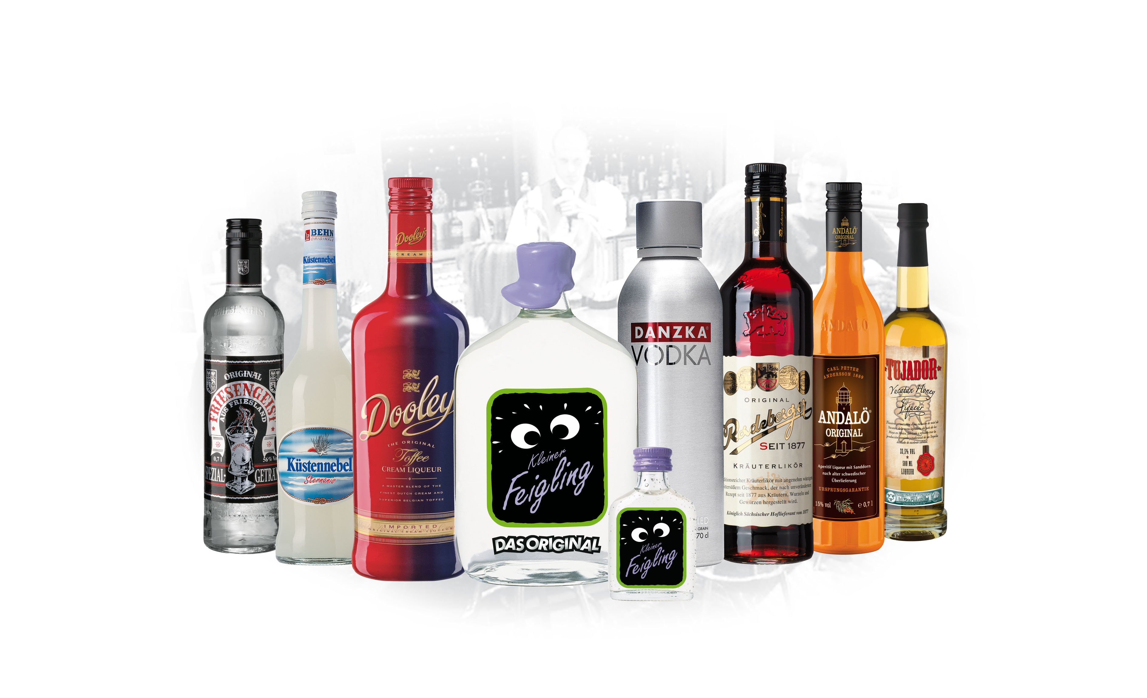 Markenübersicht 2015 der Firma Waldemar Behn GmbH